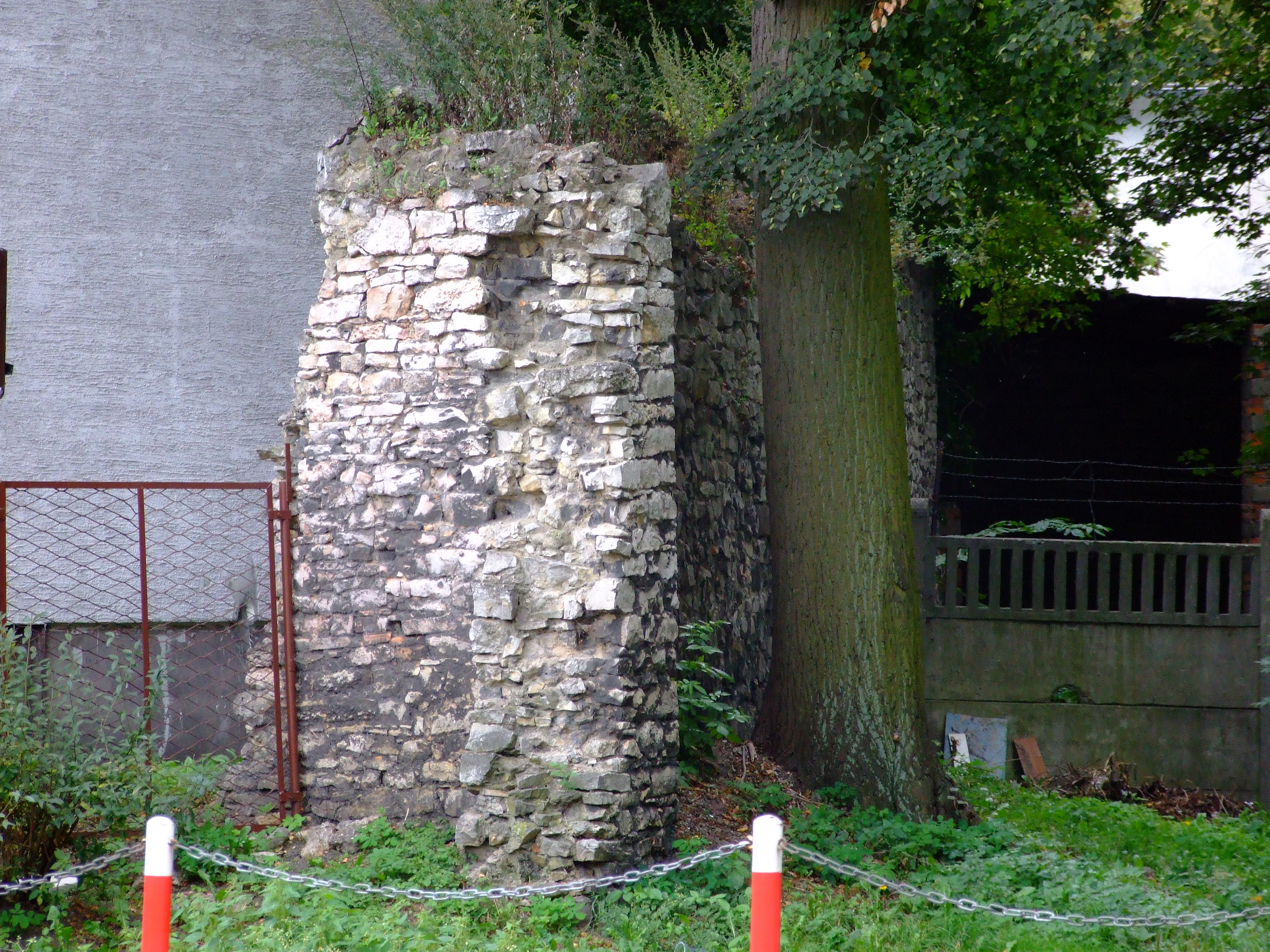 Pozostałość po murach obronnych miasta w Strzelcach Opolskich